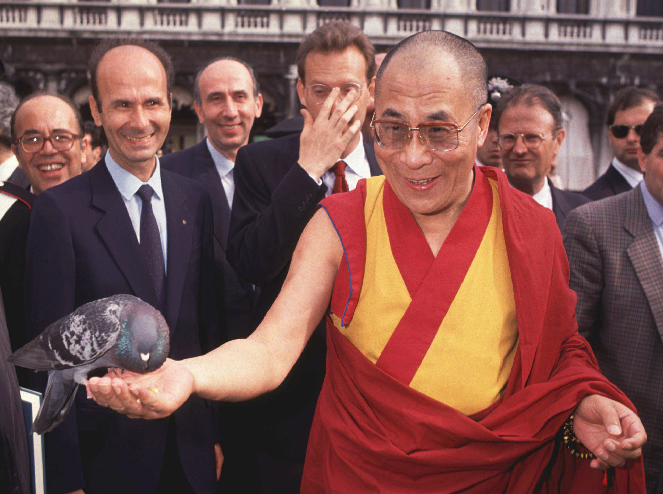 Tenzin Gyatso, XIV Dalai Lama del Tibet in occasione di una visita a Venezia nel 1988